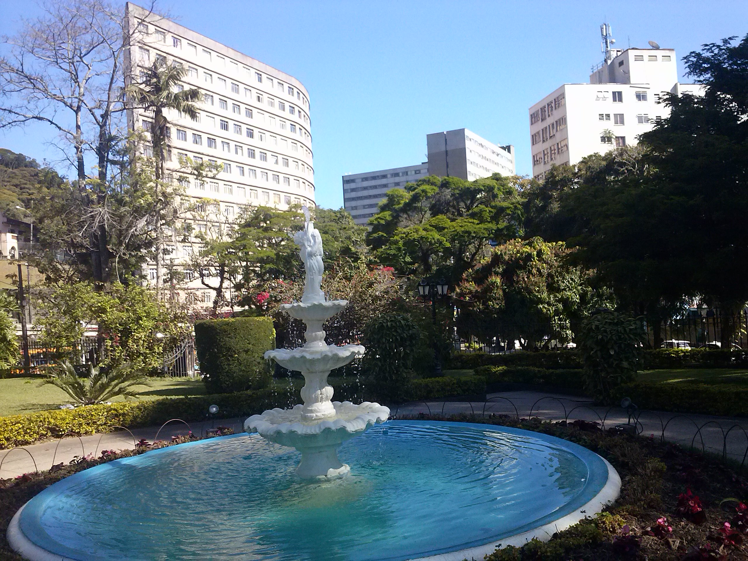 Fonte na cidade de Petrópolis (RJ), na Universidade Católica de Petrópolis, com vista para o centro da cidade.